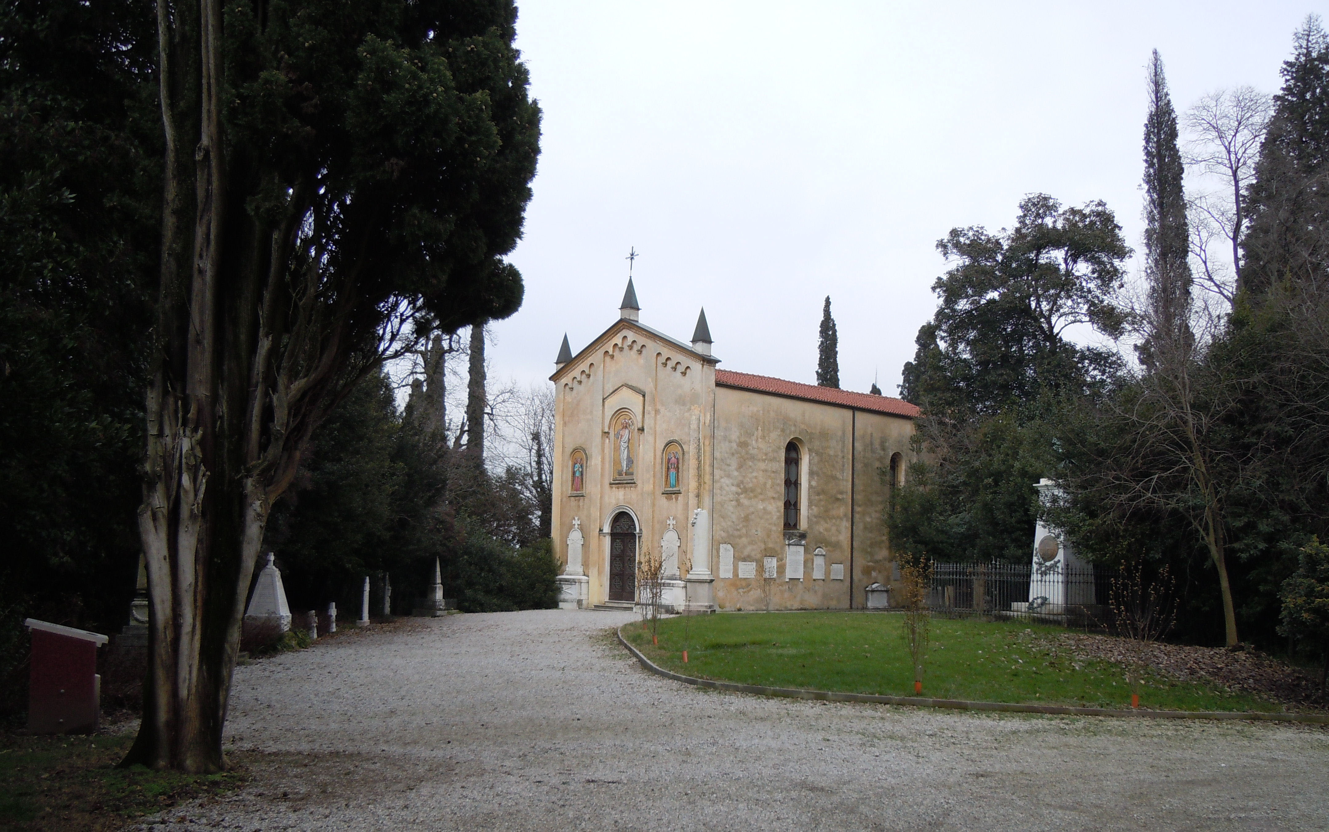 San Martino della Battaglia, chiesa ossario.